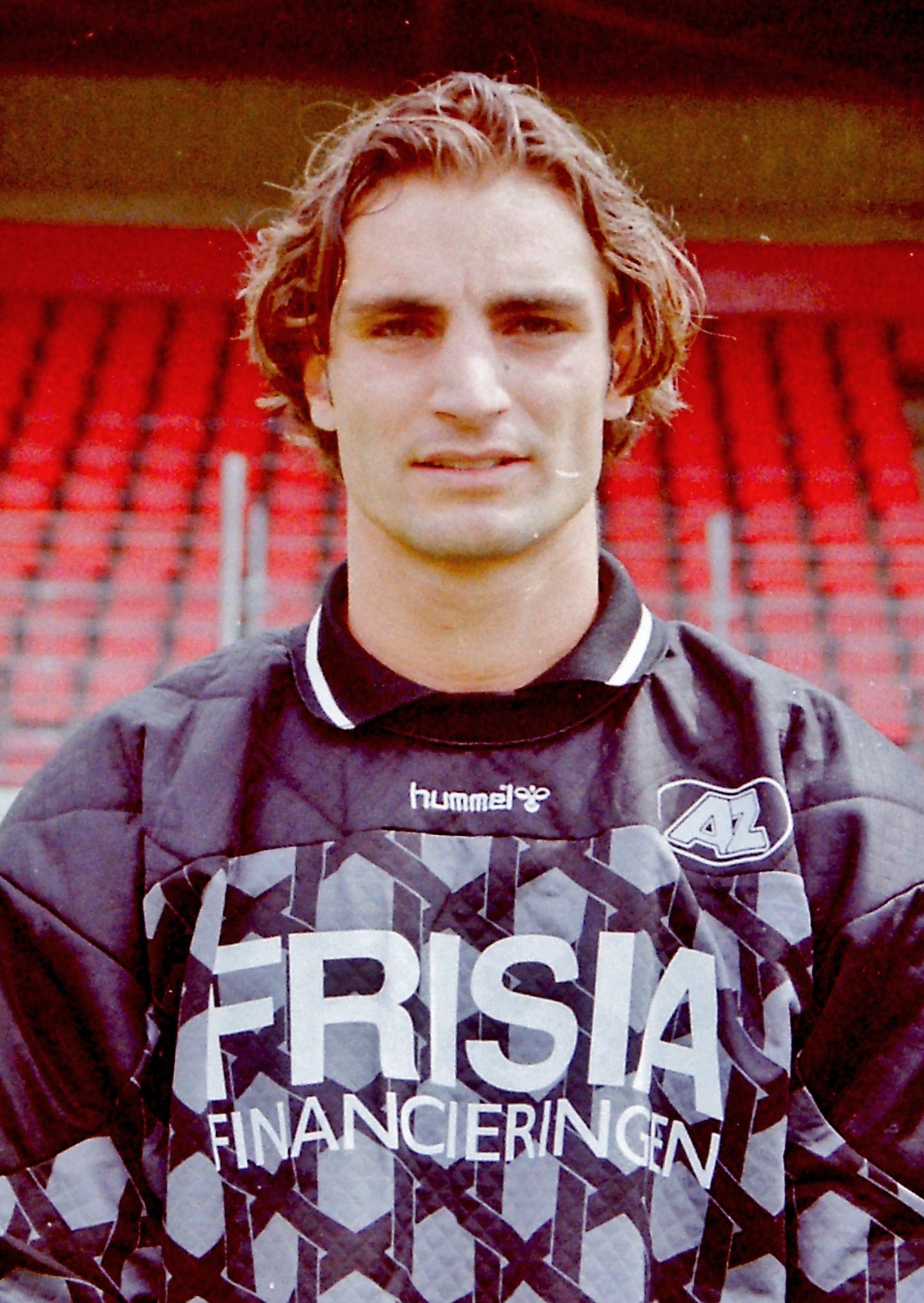 foto door Thijs de Ruiter genomen op de persdag van AZ